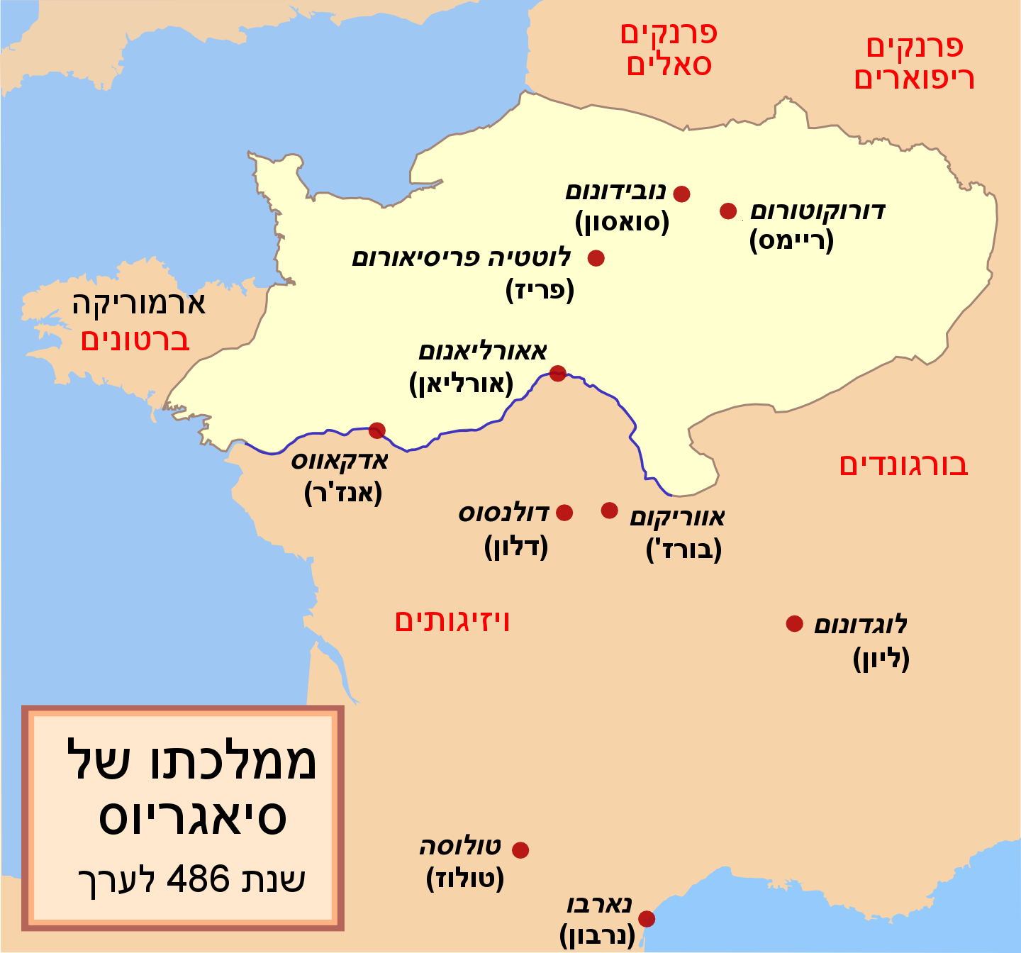 Reame di Siagrio (486)